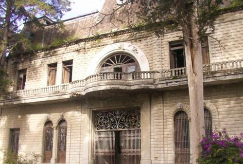 Cerca de Medias tierras en Tulancingo Hidalgo